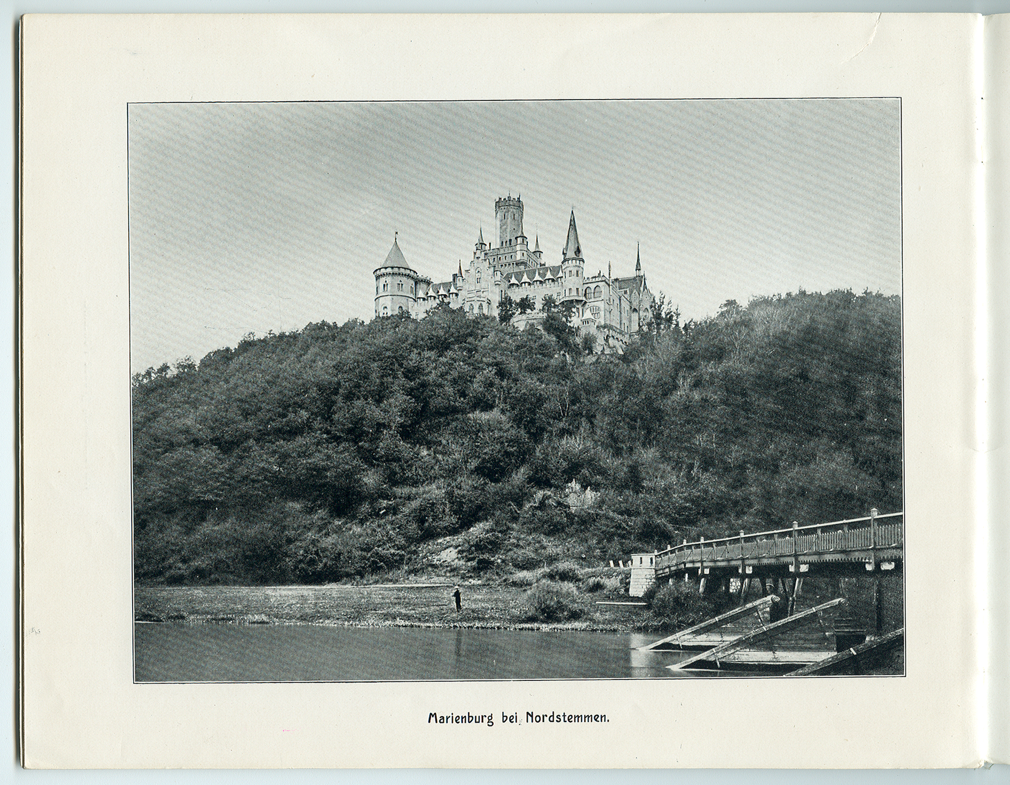 „Hannover – 26 Ansichten nach künstlerischen Aufnahmen“ von Karl F. Wunder. – Marienburg bei Nordstemmem.